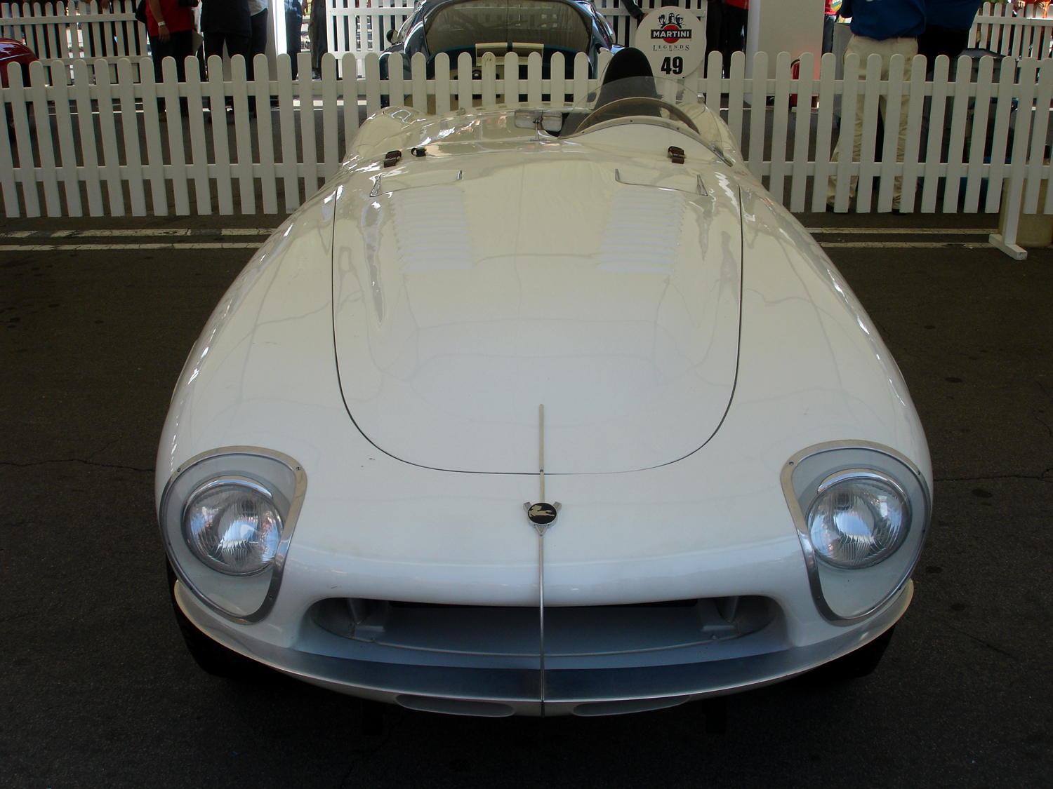 Pegaso Barqueta Pedralbes, exposat al festival Martini Legends (commemoració del 75 aniversari del Circuit de Montjuïc)